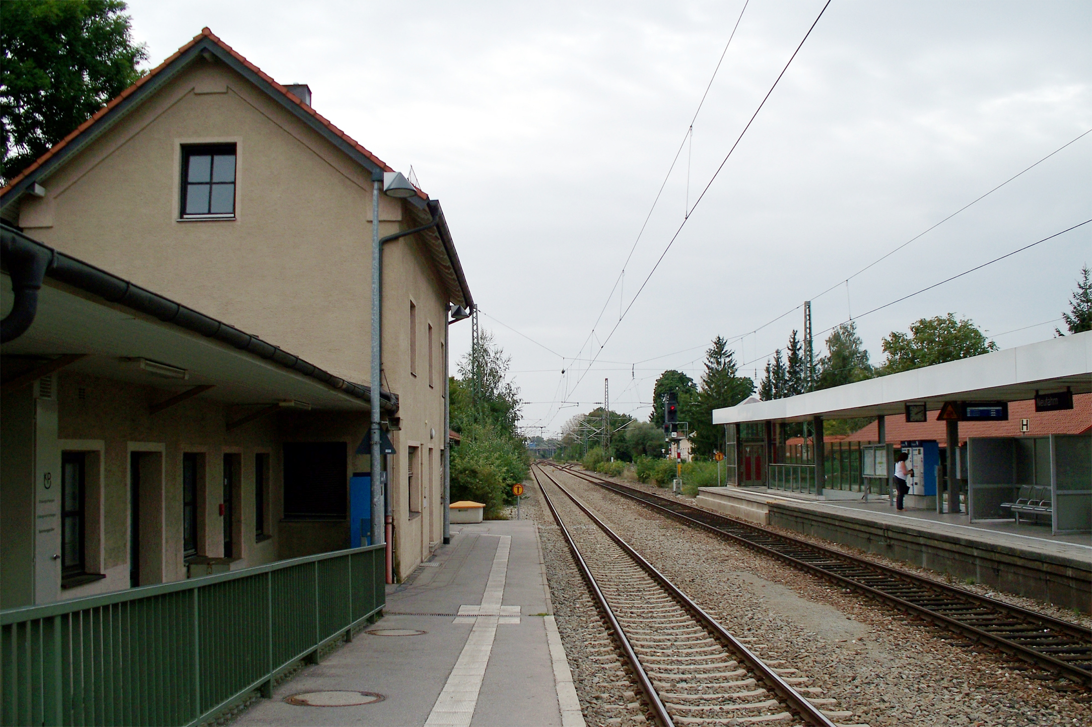 Der Bahnhof von Neufahrn der Linie S1 der S-Bahn-München.